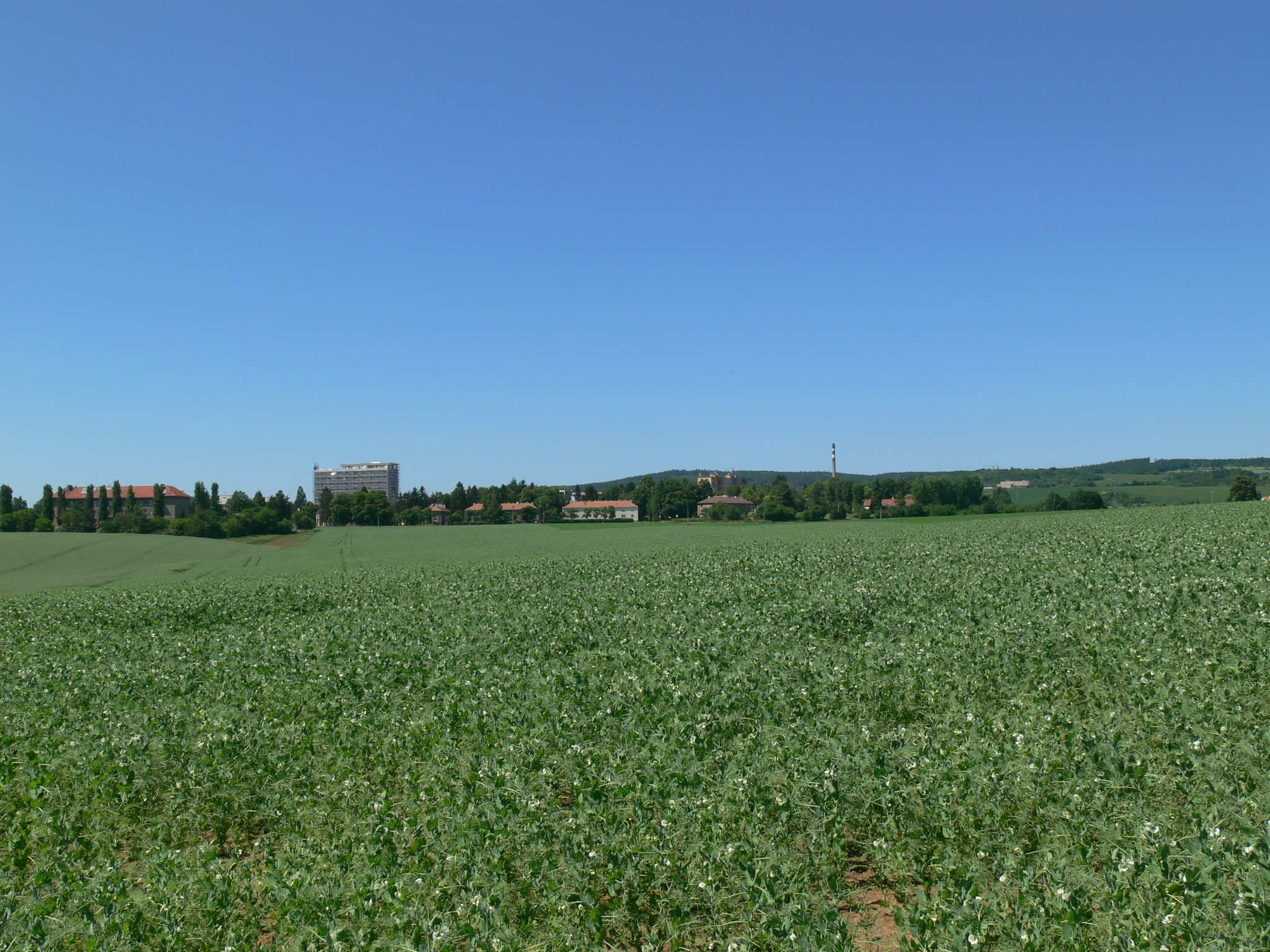 Dědice, Dědice, sídliště Víta Nejedlého